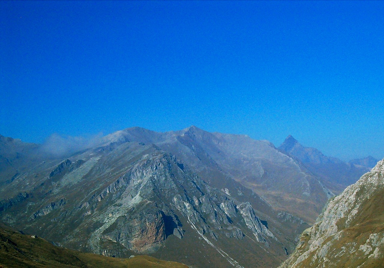 Il monte Ferra (Valle Varaita) visto dalla gola delle Barricate, scendendo dal col de l'Autaret (versante sud)